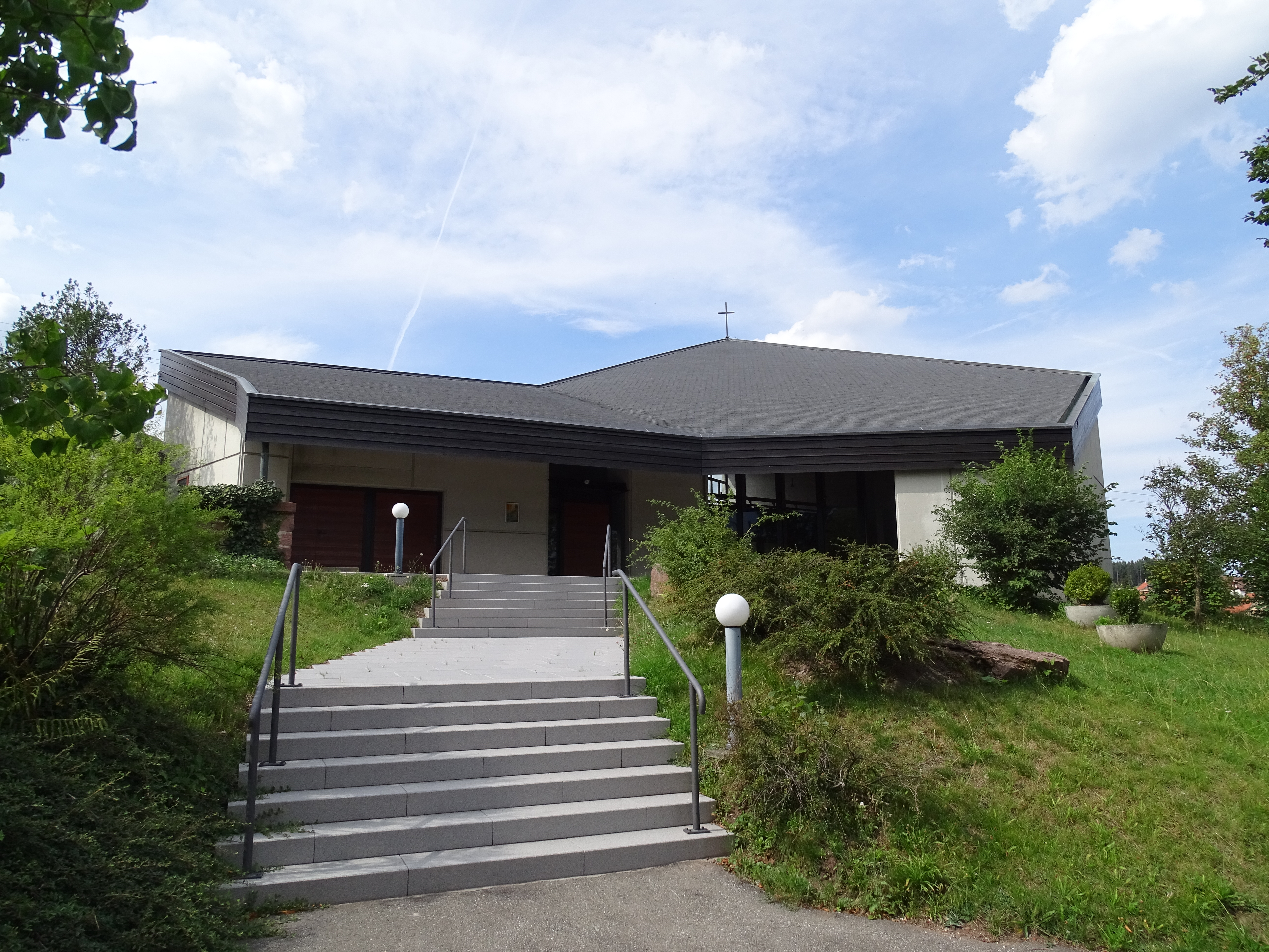 Auferstehungskirche Agenbach, zugleich Aussegnungshalle in Neuweiler-Agenbach, Kreis Calw.